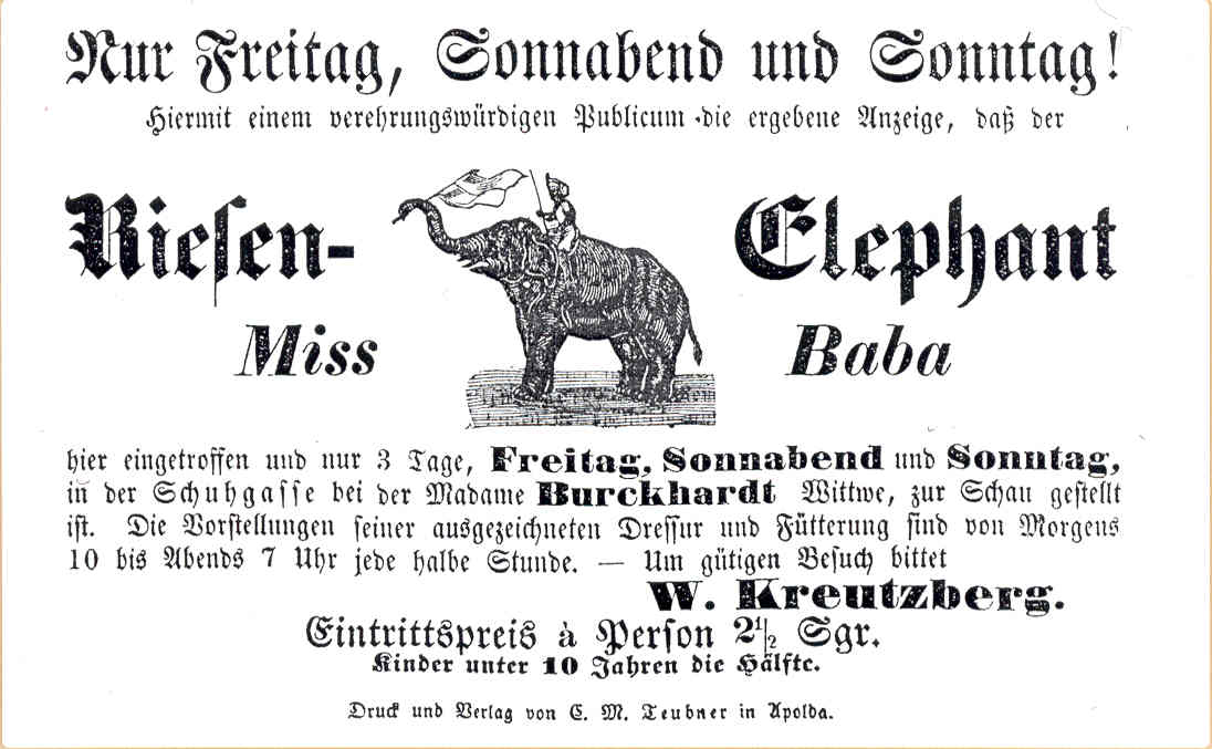 Elefantenkuh "Miss Baba". Ankundigungszettel der Menagerie Kreutzberg, vermutlich Februar 1857